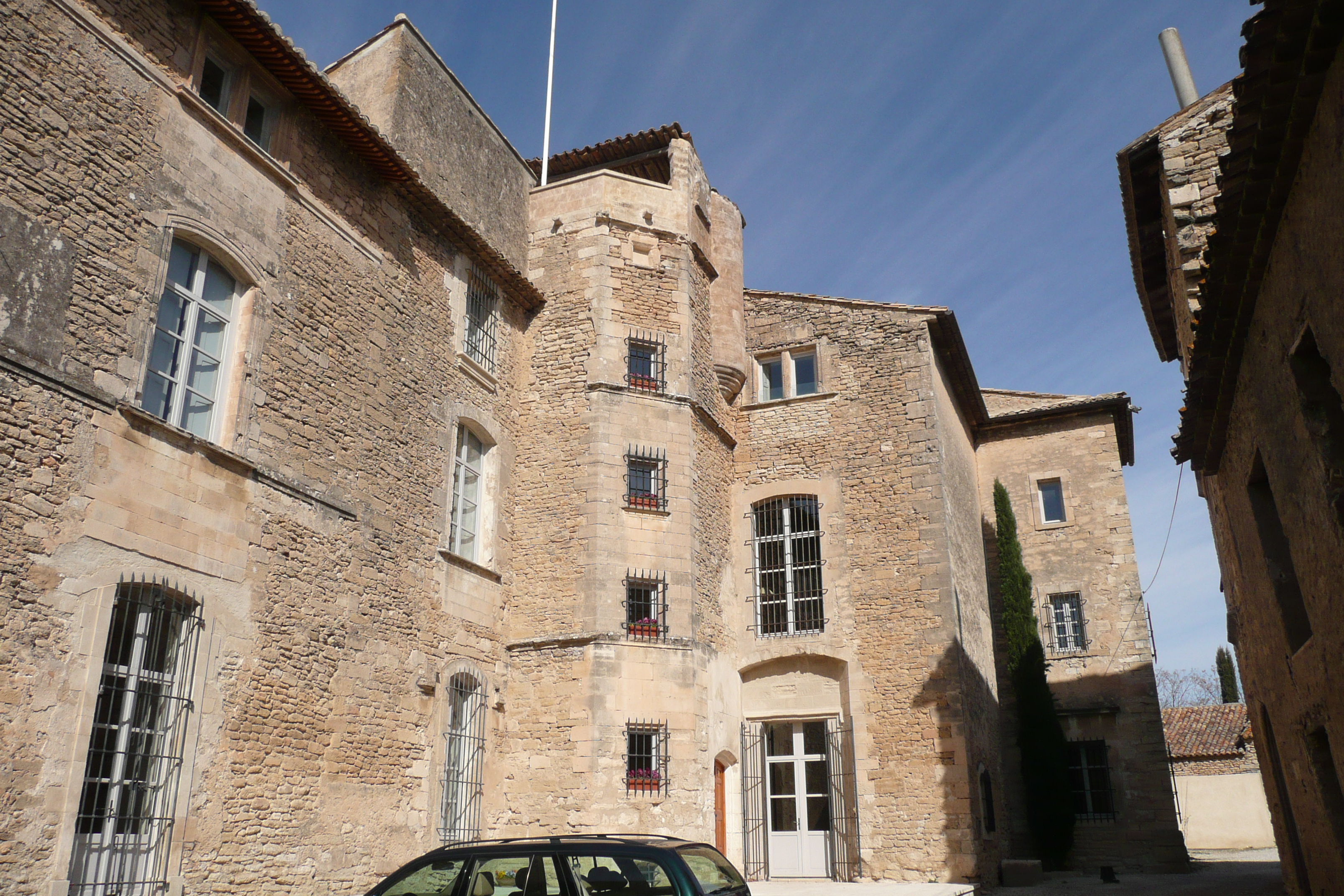 Château à Cabrières d'Avignon.